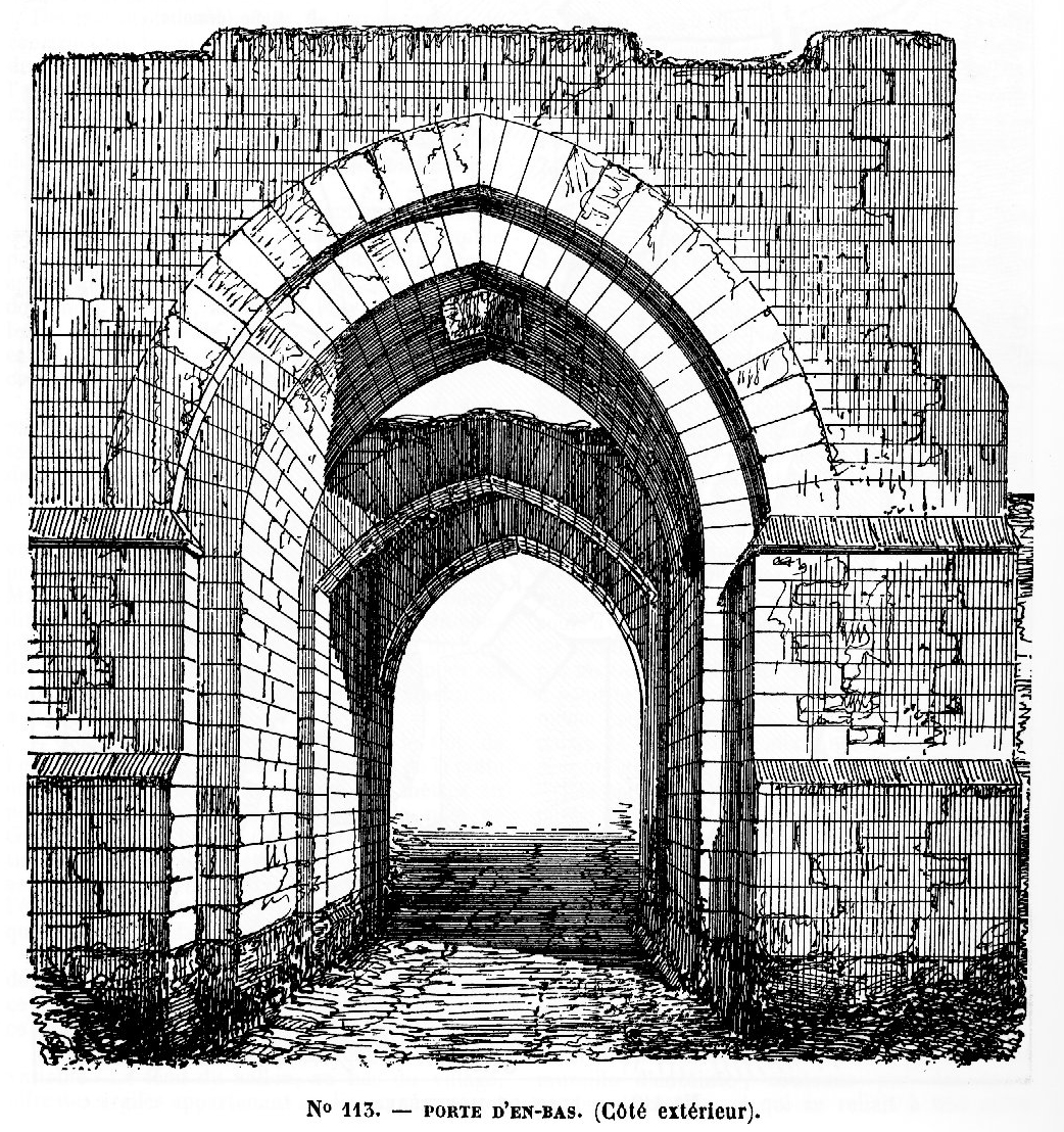 Montréal (89) : Porte d'en bas (XIIIe siècle)